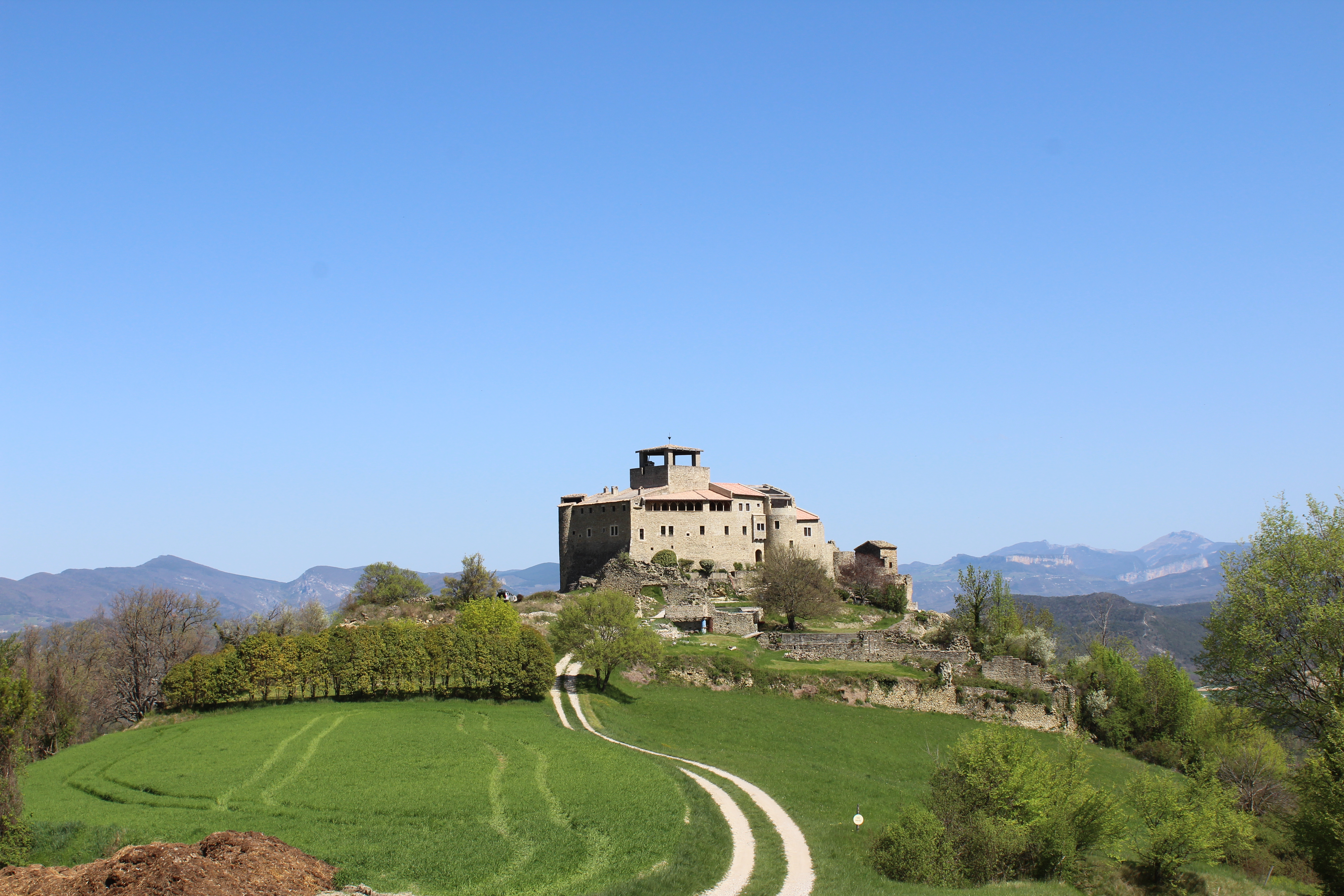 Photographie du château de la commune de Piégros-la-Clastre